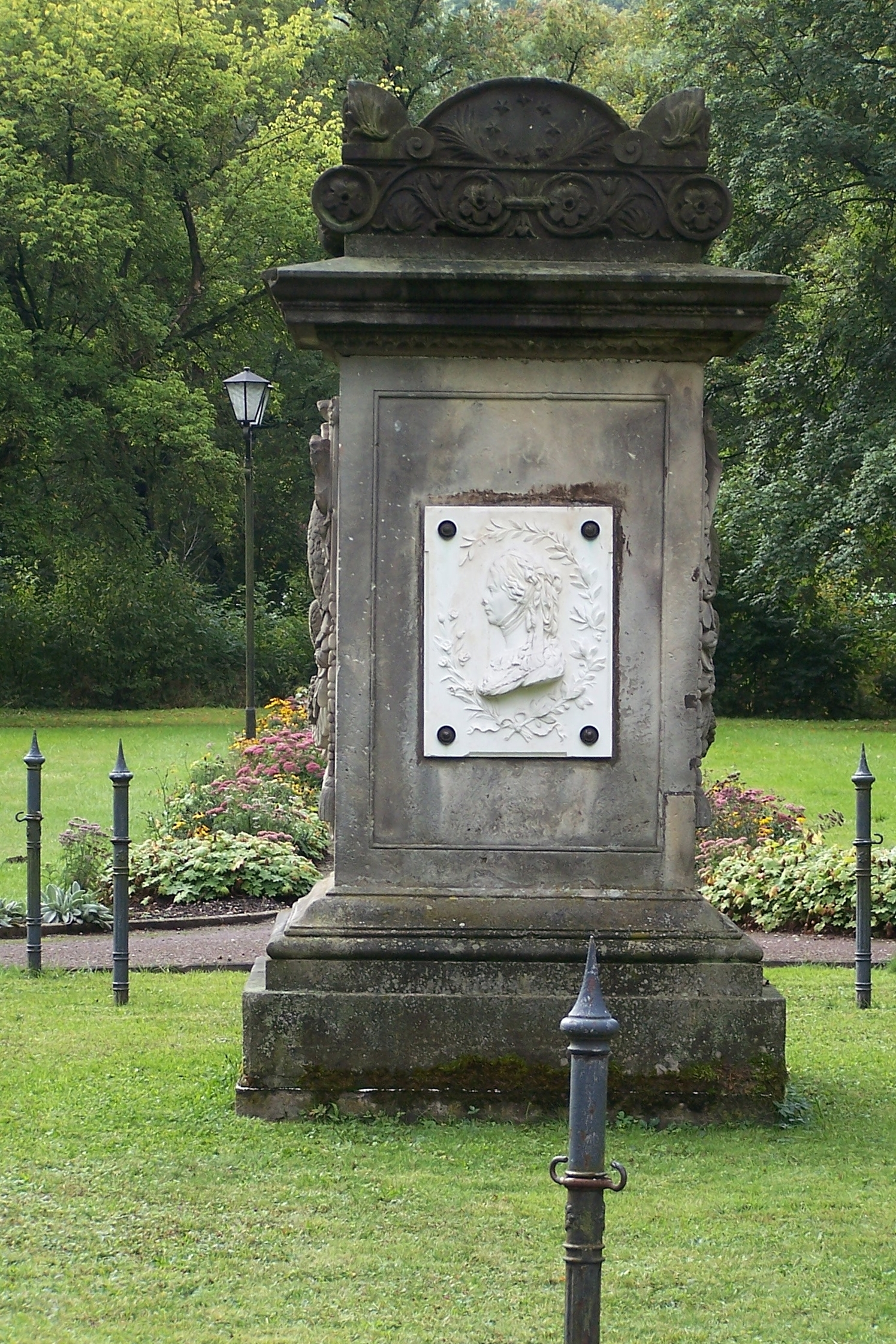 Das Luisen-Denkmal im Schlosspark zu Hilburghausen.